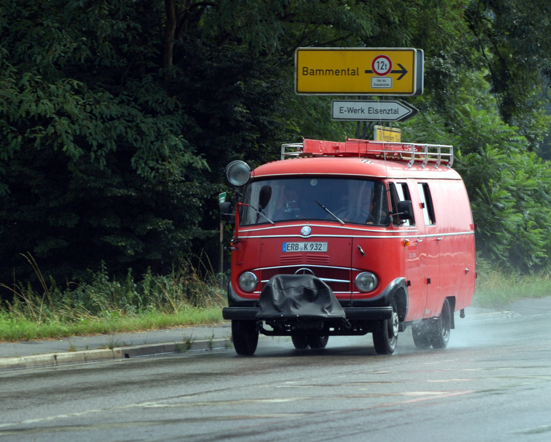 Mercedes-Benz L319 in Bammental (B45)